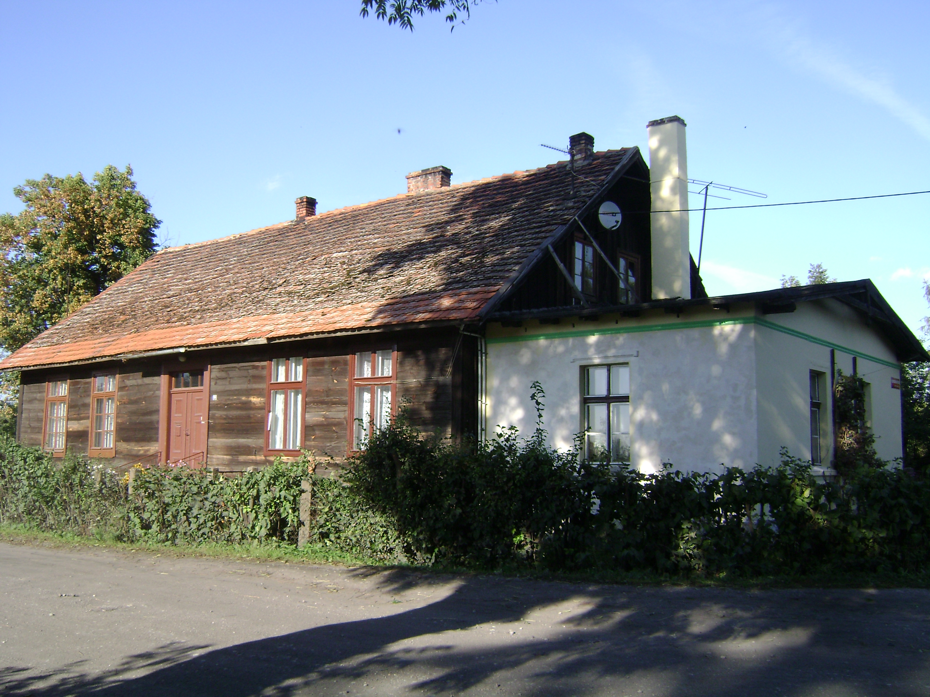 chata nr 58, drewn., 1740 Dragacz, Gmina Dragacz